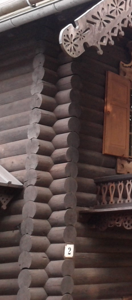 Détail de l'ornementation de maison Alexandrowka